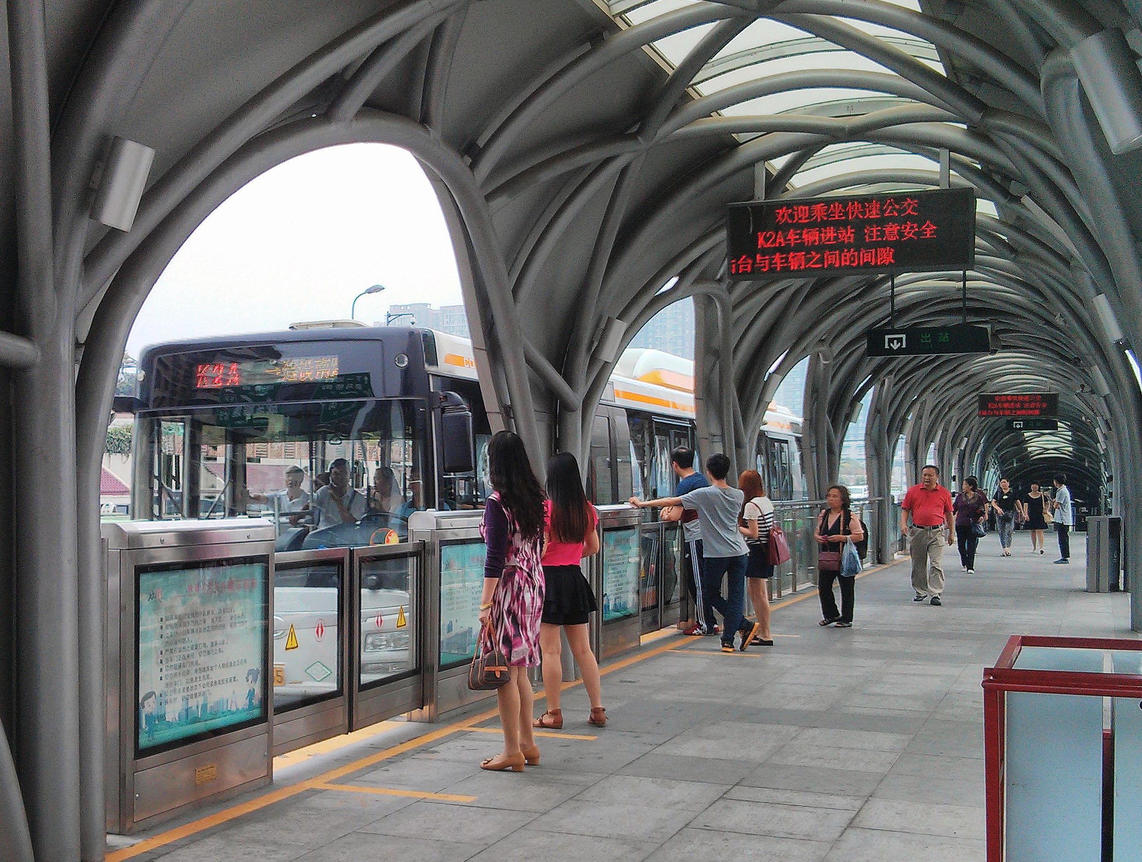 中文（中国大陆）: 成都BRT站台 （桃蹊路口）